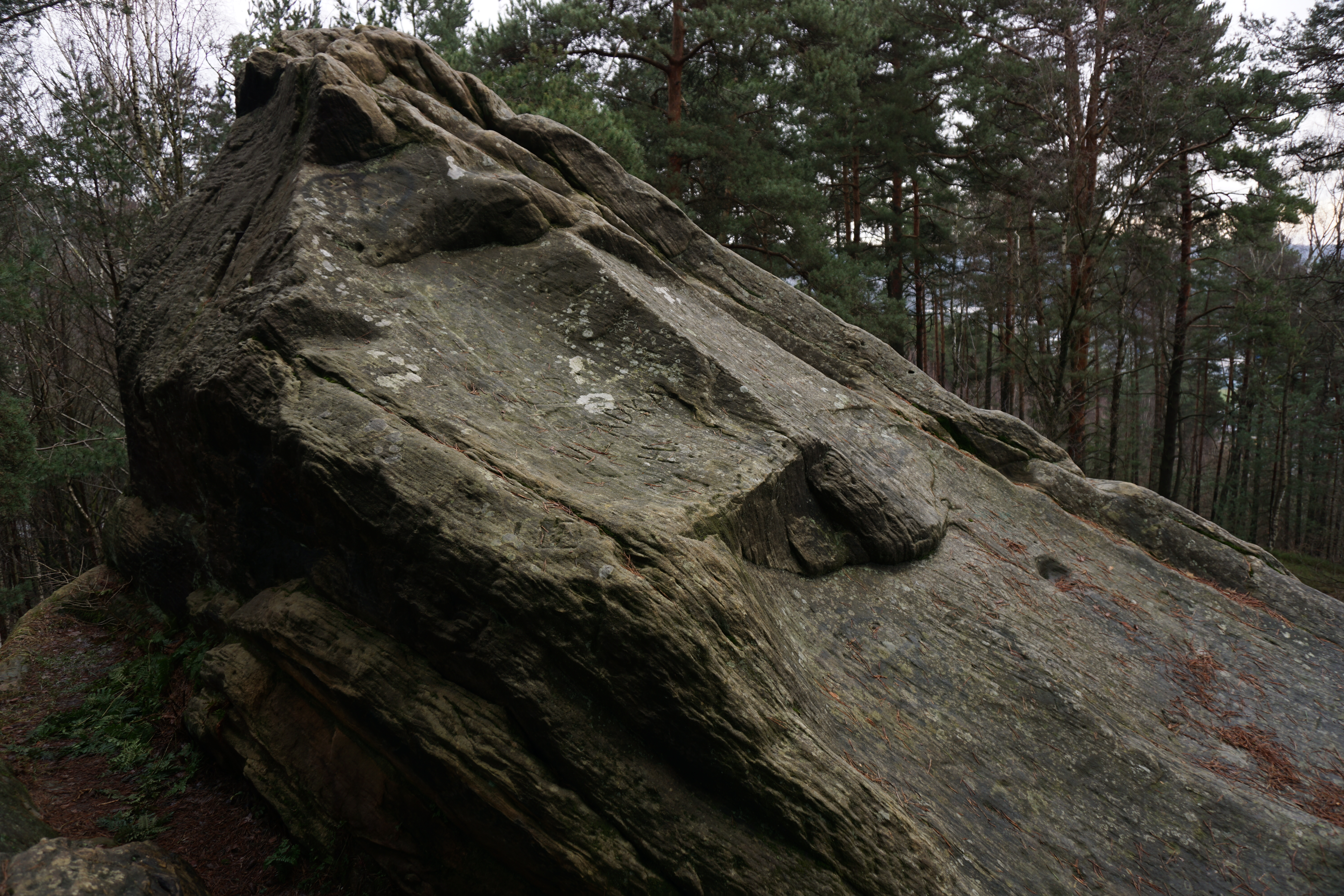 Skála Štefanka (též Štefánka) v Městském lese u Hodkovic nad Mohelkou